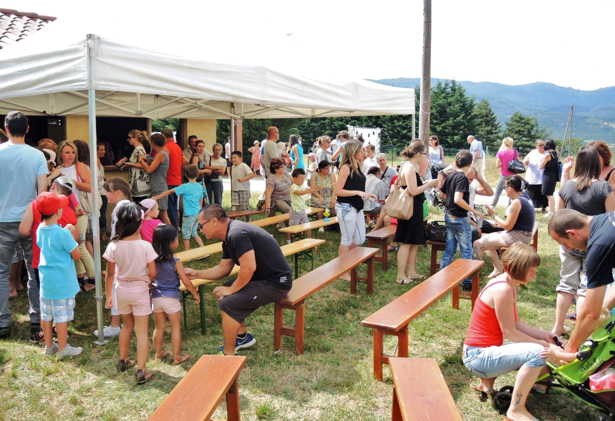 Saint-Jacques-d'Atticieux détail